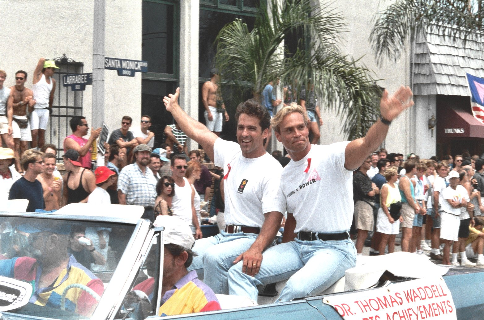 Los Angeles, June 1993